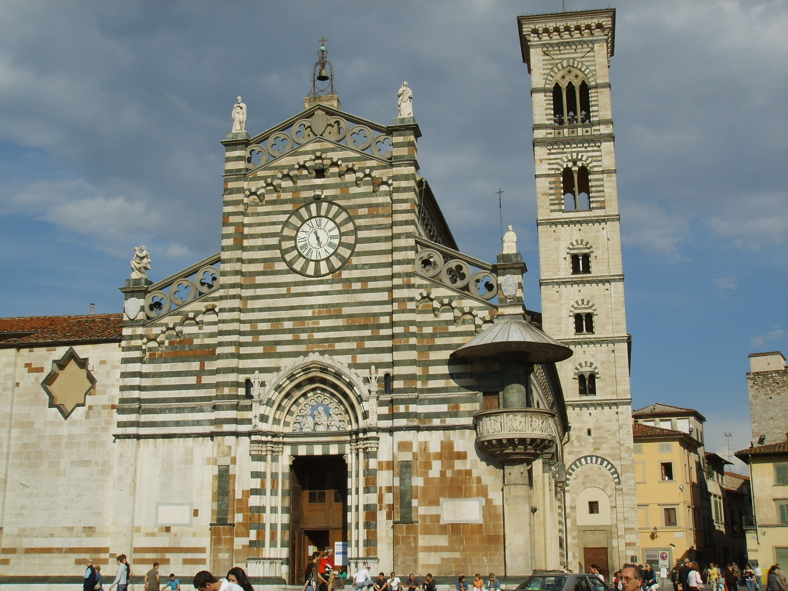 Duomo, façade, Prato, Italy